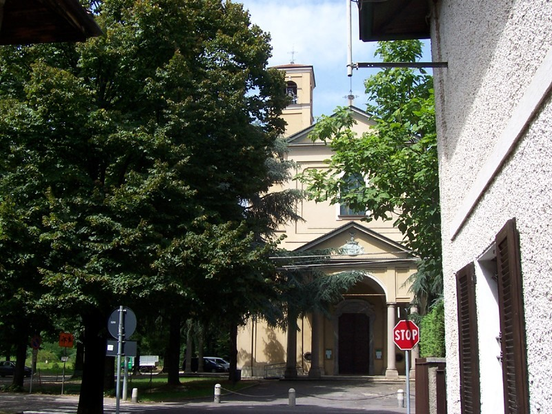 Ornago - Santuario della B.V. del Lazzaretto